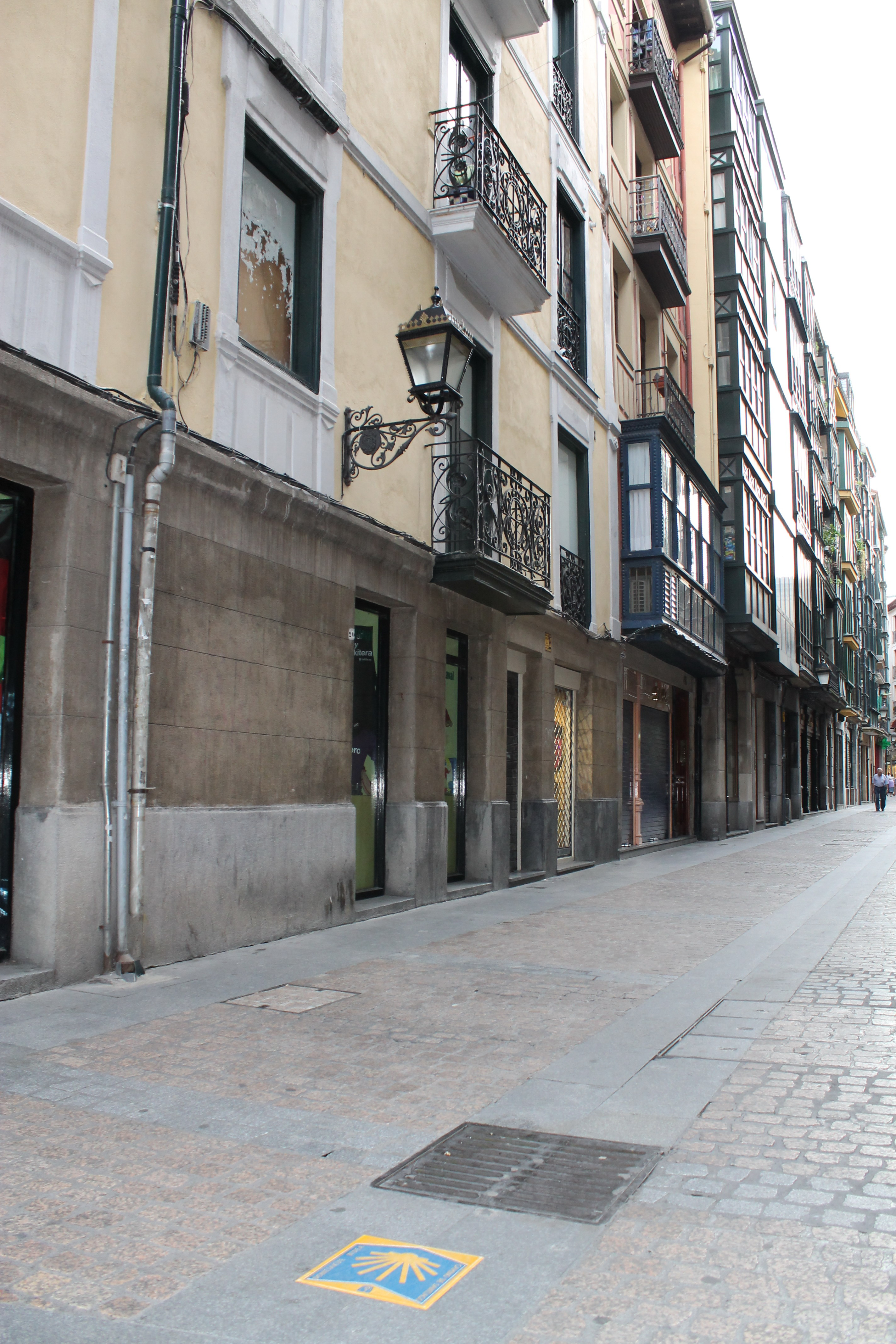 Camino de Santiago a su paso por el casco viejo de Bilbao